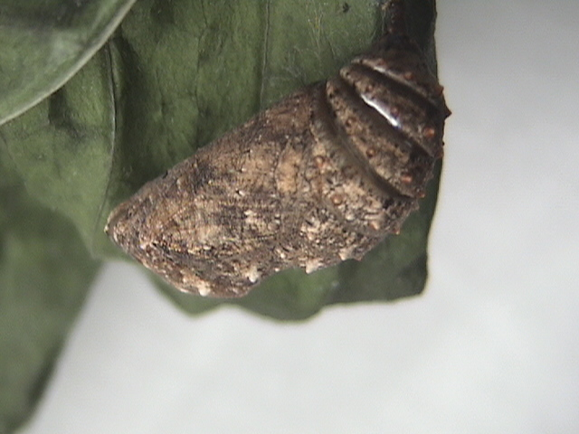 Lemon pansy pupa (Junonia lemonias)